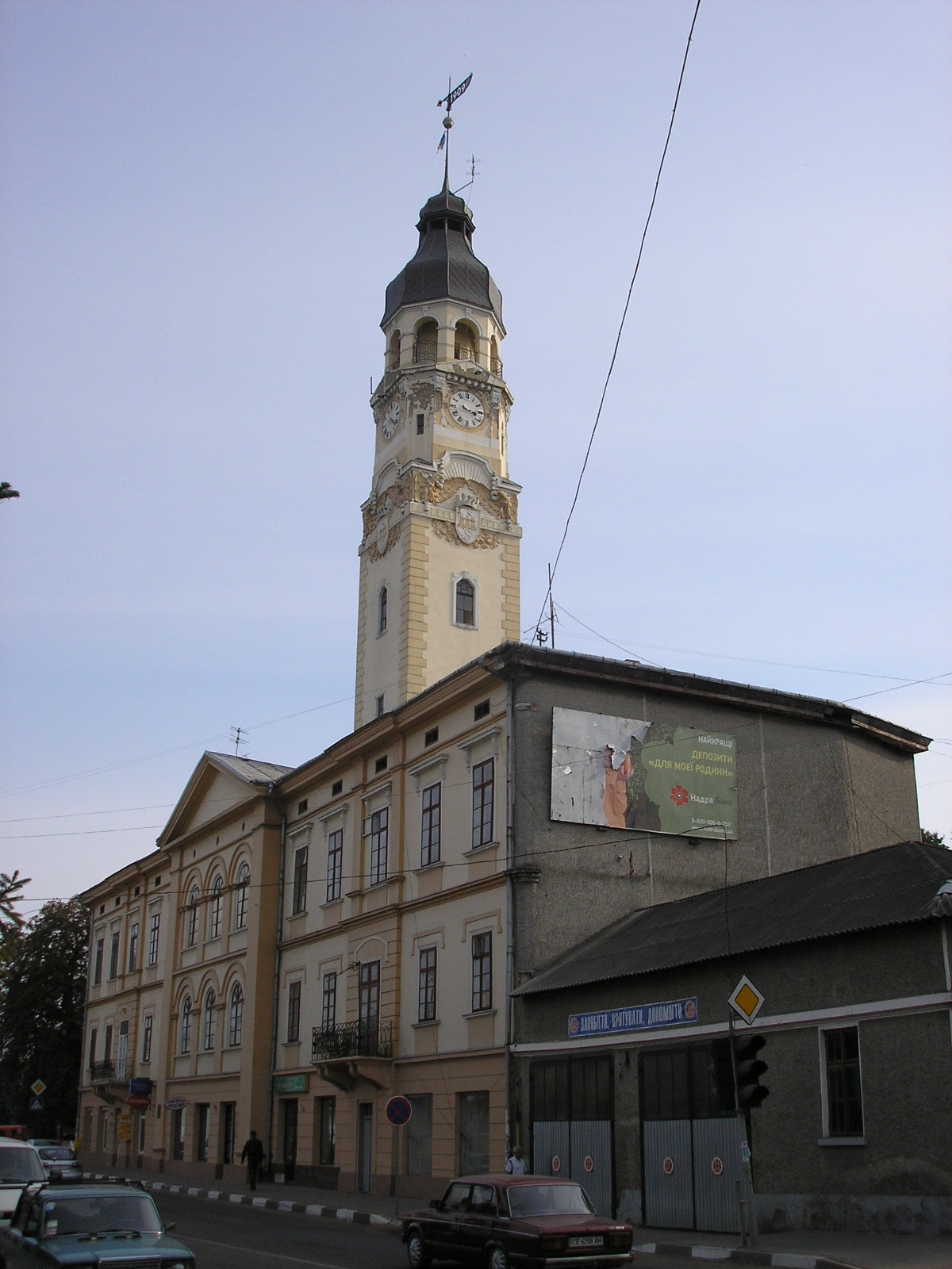 Das Rathaus von Sniatyn bei Iwano-Frankiwsk, Ukraine / Town hall of Sniatyn near Ivano-Frankivsk, Ucraine